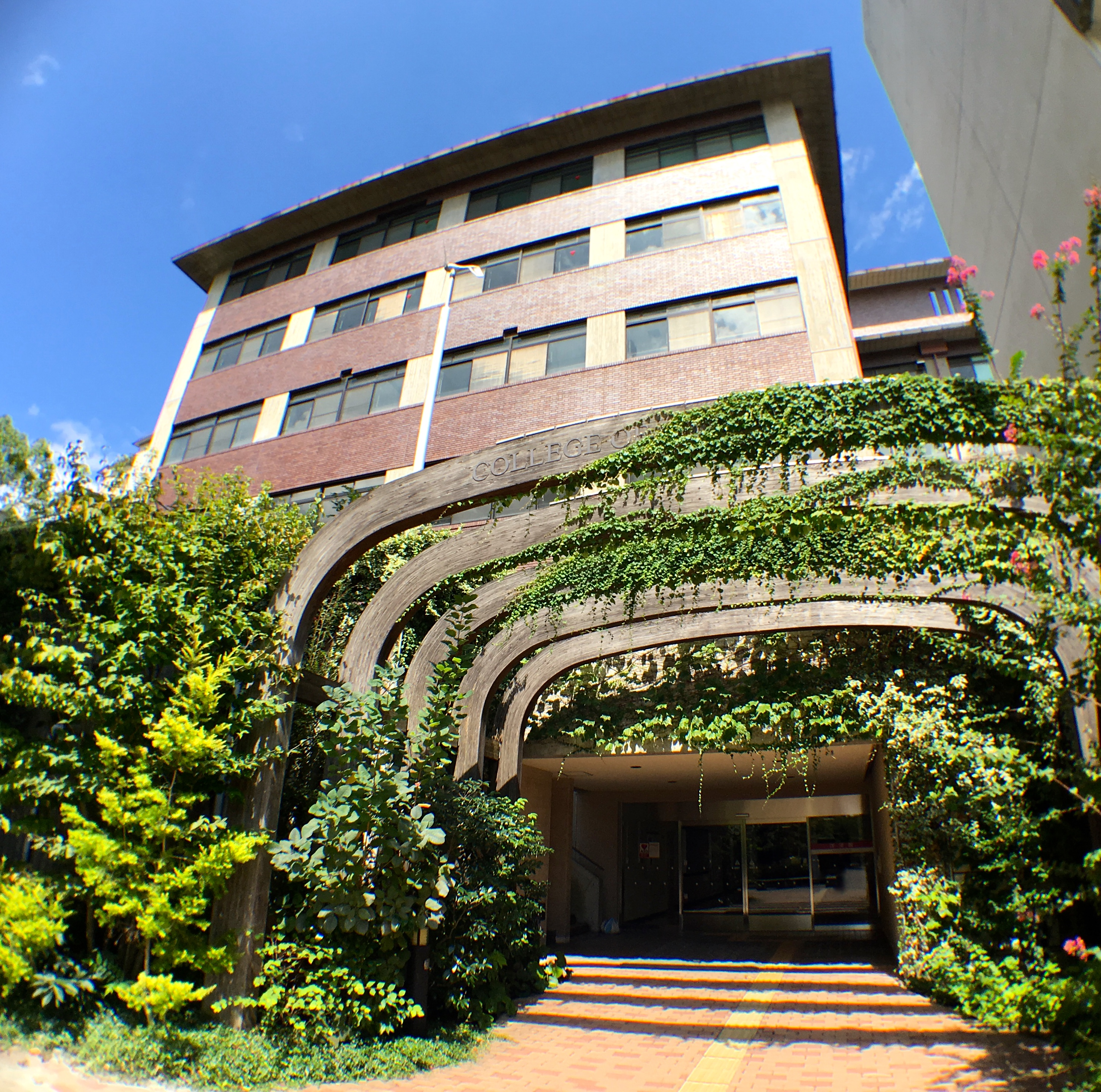 The photo was taken by me on September 10, 2016.